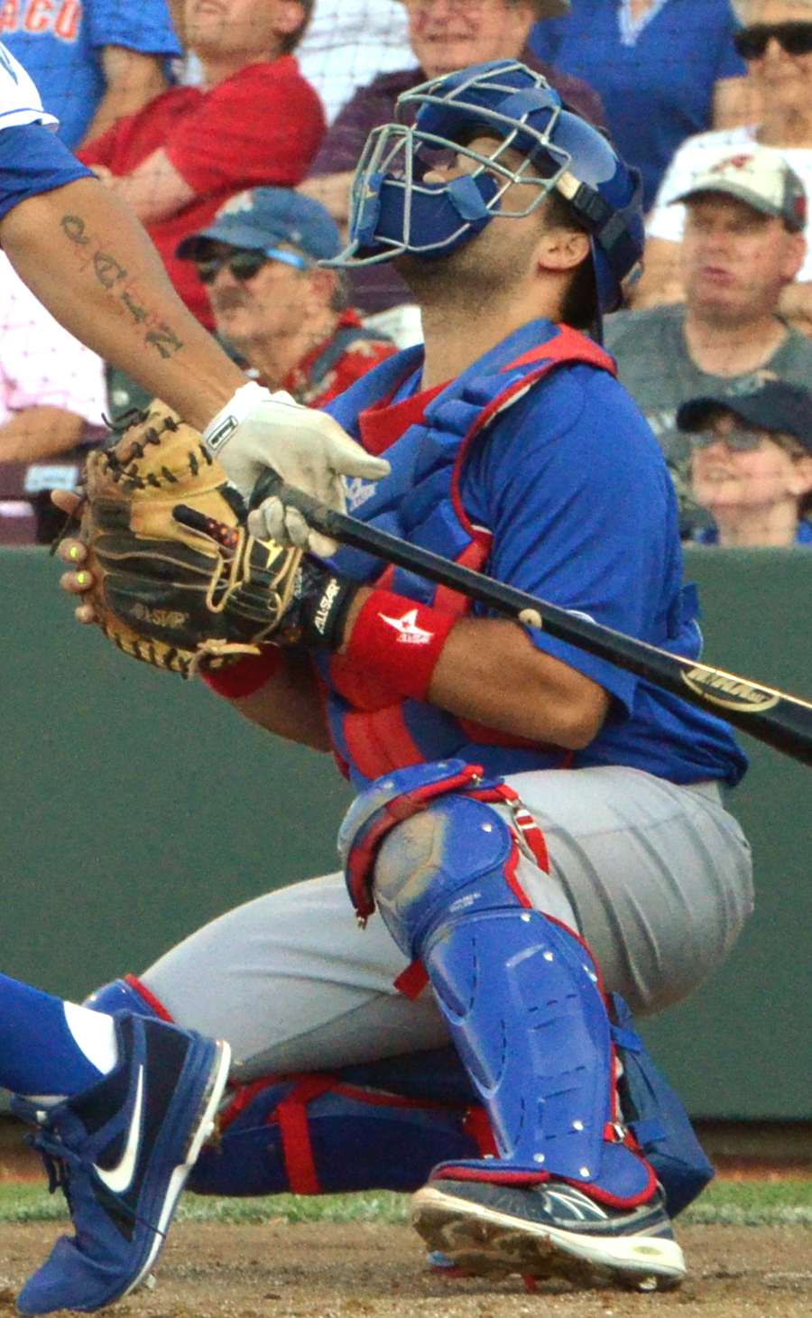 Rafael Lopez